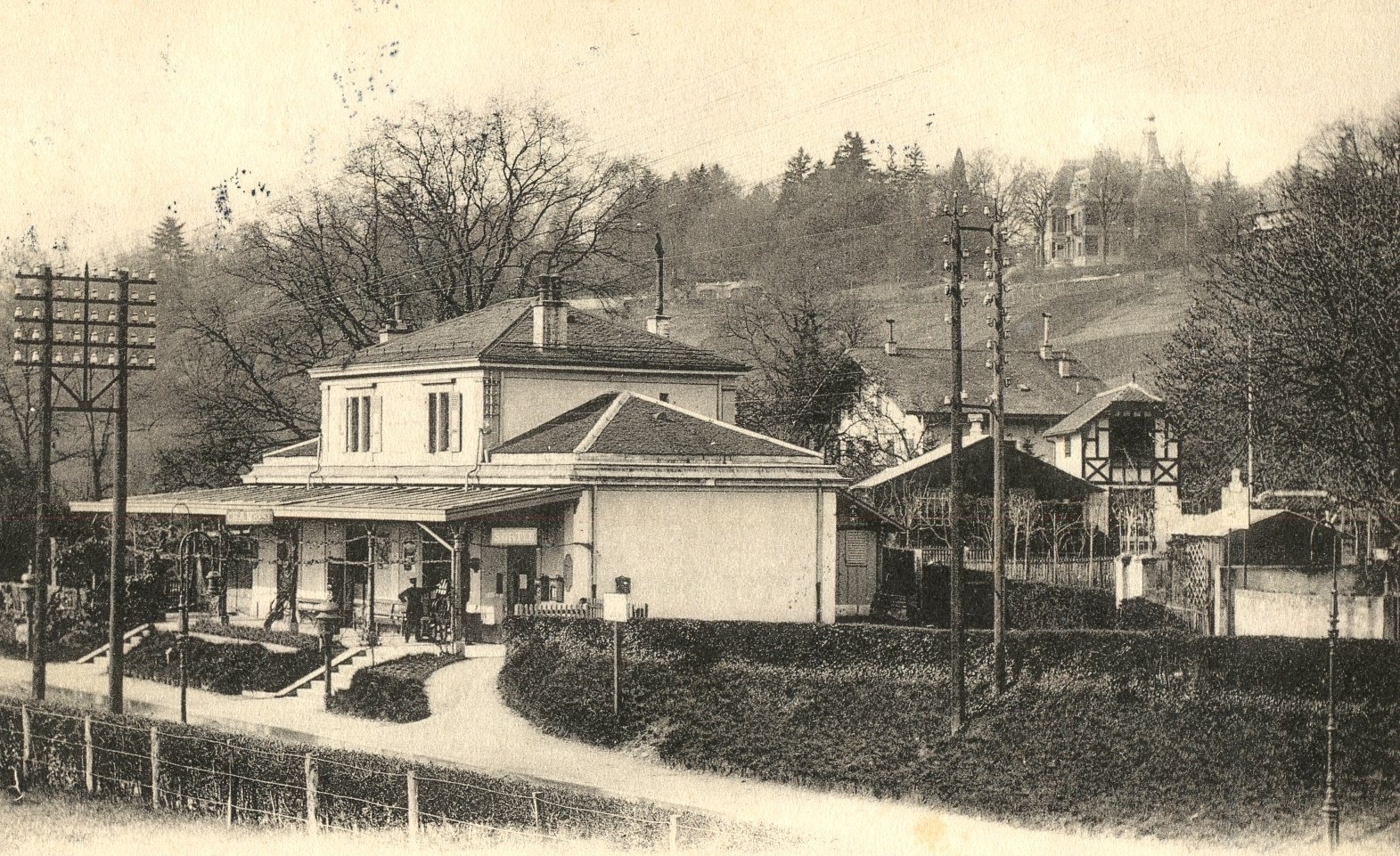 L'ancienne gare de Chambésy datant de 1861, dans la campagne genevoise.